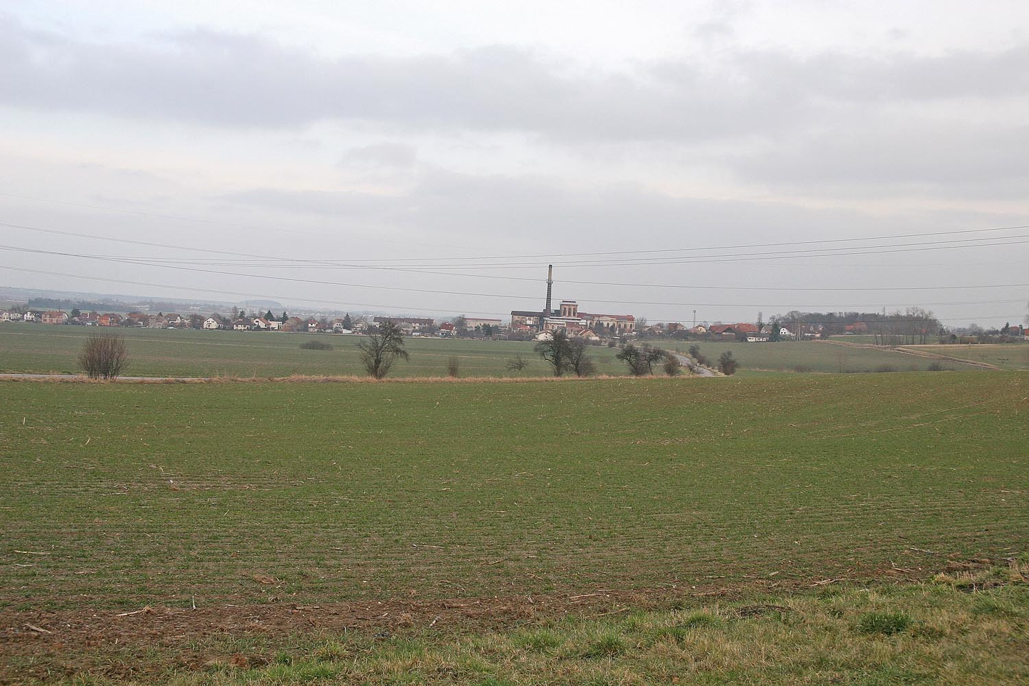 Pohled na obec Syrovátka od hřbitova v Dobřenicích, district Hradec Králové autor: Prazak